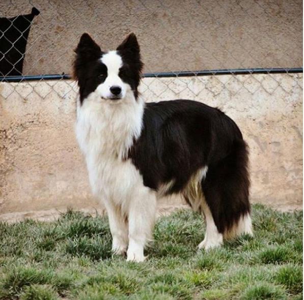 Border Collie Blanca y Negra Hembra